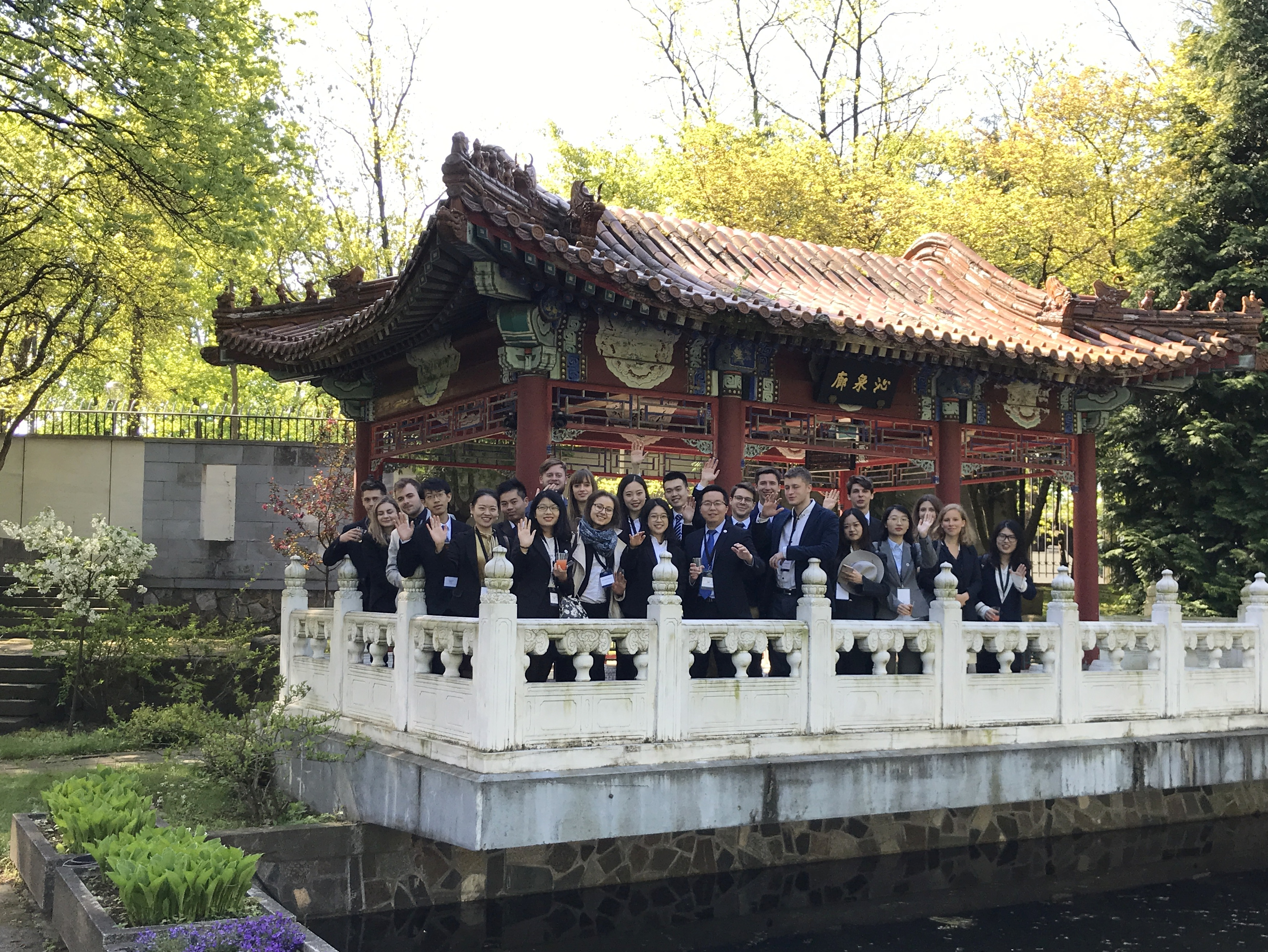 Ambasada Chińska V Edycja WBF